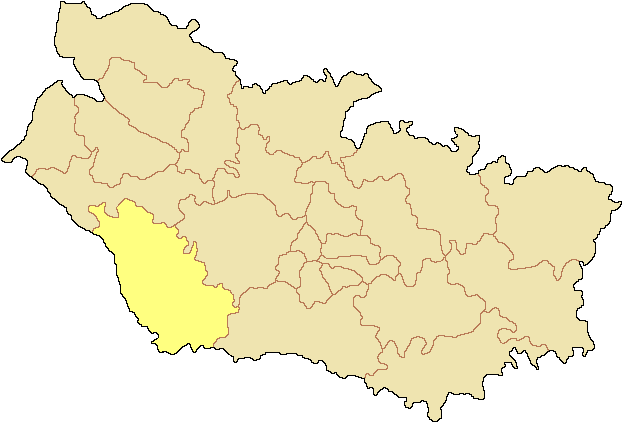 Canton de Poix-de-Picardie dans le département de la Somme